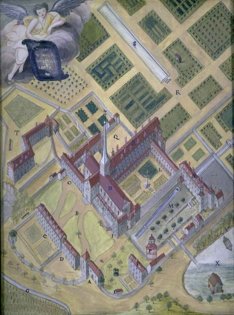 Plan du monastère de Port-Royal-des-Champs d'après une gravure de Magdeleine Hortemels